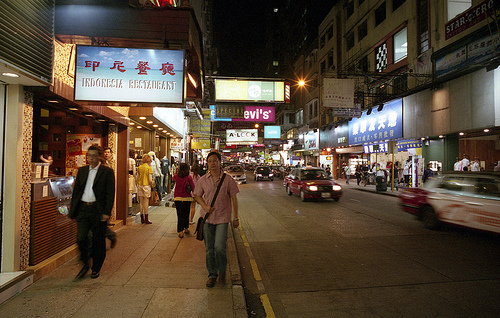 Tsim Sha Shui